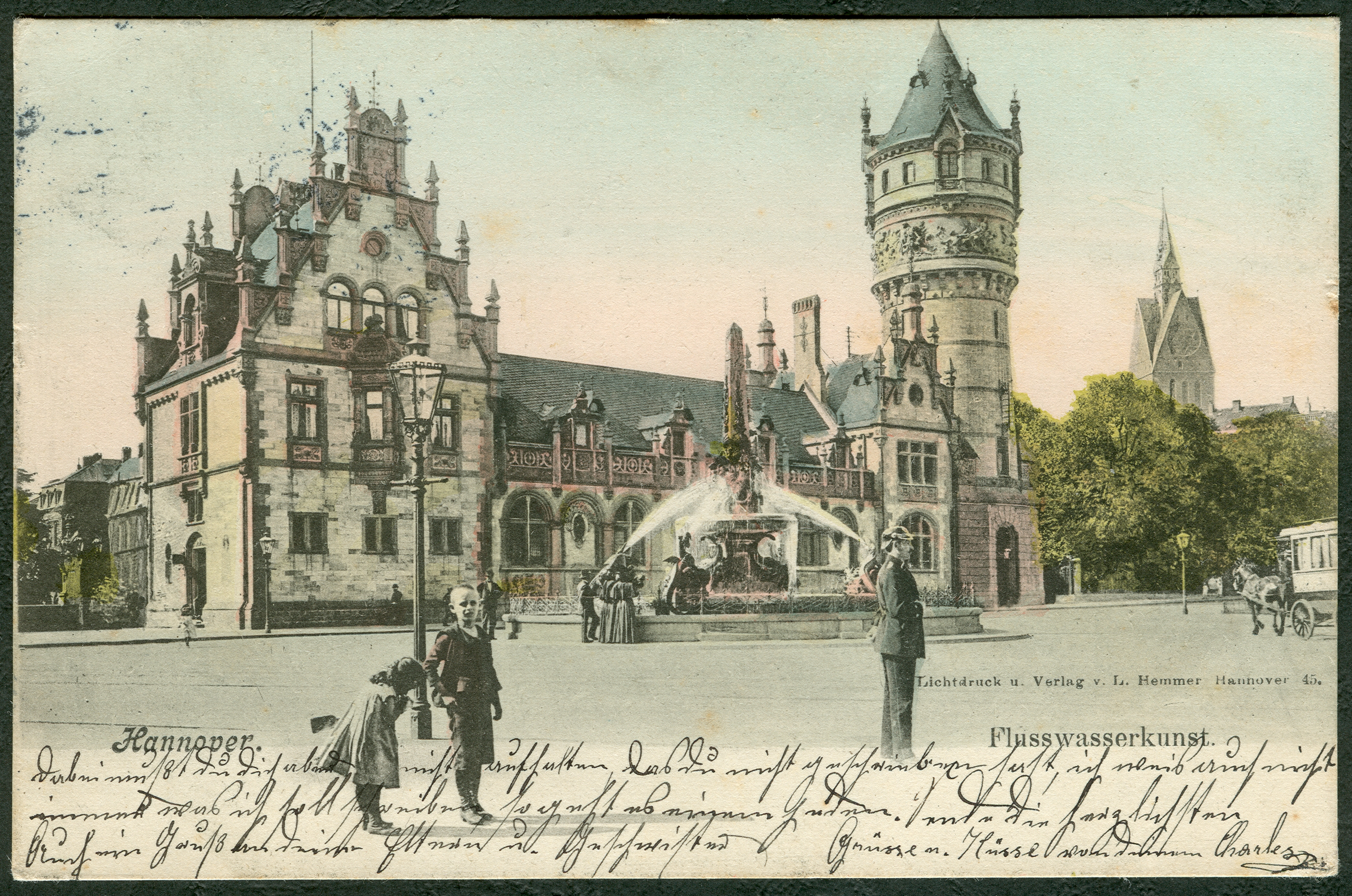 Kolorierte Ansichtskarte Nummer 45 von Ludwig Hemmer. Blick auf den ehemals "Himmelsreich" genannten Platz mit der Flusswasserkunst und dem "Monumentalbrunnen" davor. Der Polizist mit der Pickelhaube fand für einen kurzen Moment den Blick auf den vorbeifahrenden Pferdeomnibus wohl interessanter; von den beiden Kindern im Vordergrund hat das kleine Mädchen wohl etwas anderes entdeckt als der Junge in den Knickerbockern.